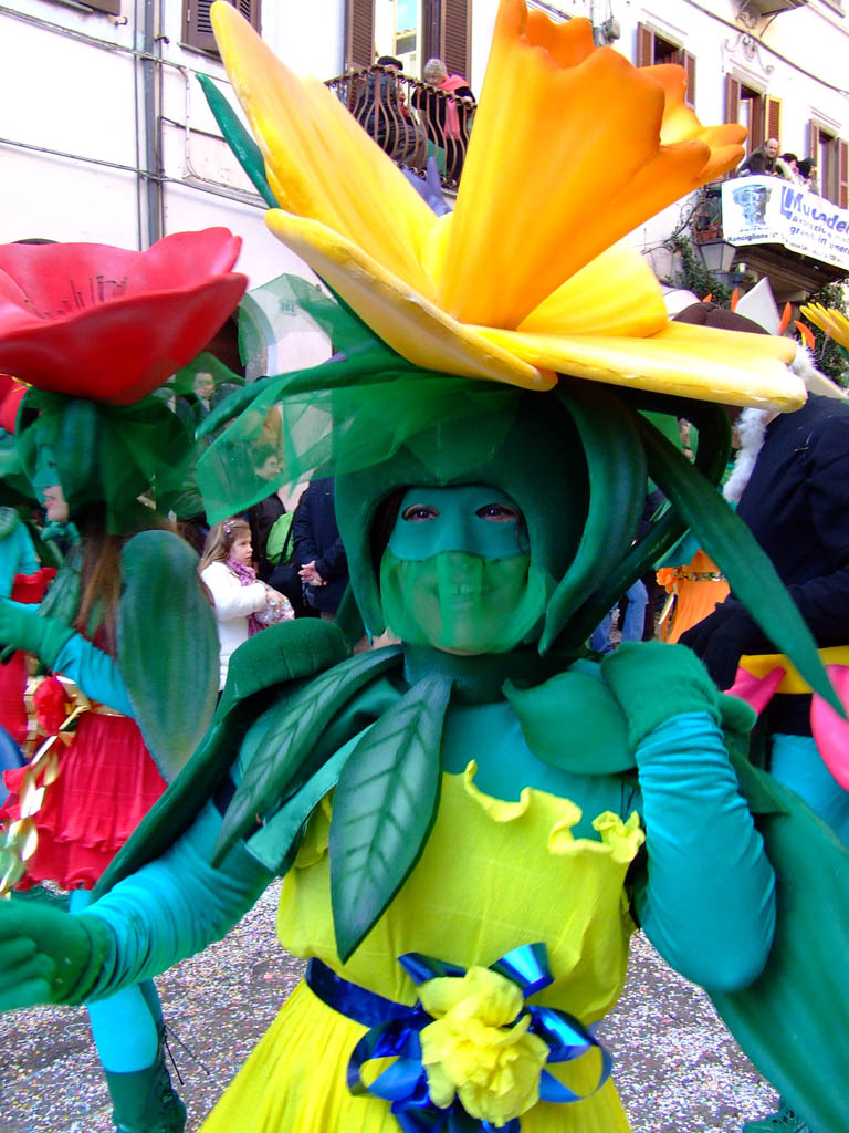 Carnival of Ronciglione